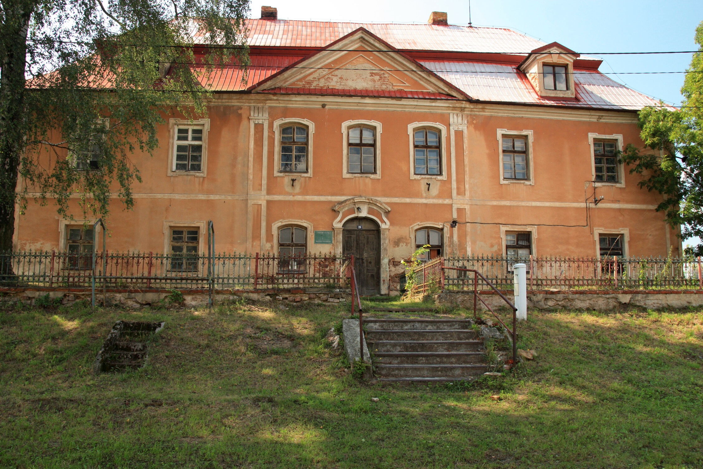 Zámek Slezské Pavlovice, Slezské Pavlovice 29, Slezské Pavlovice.